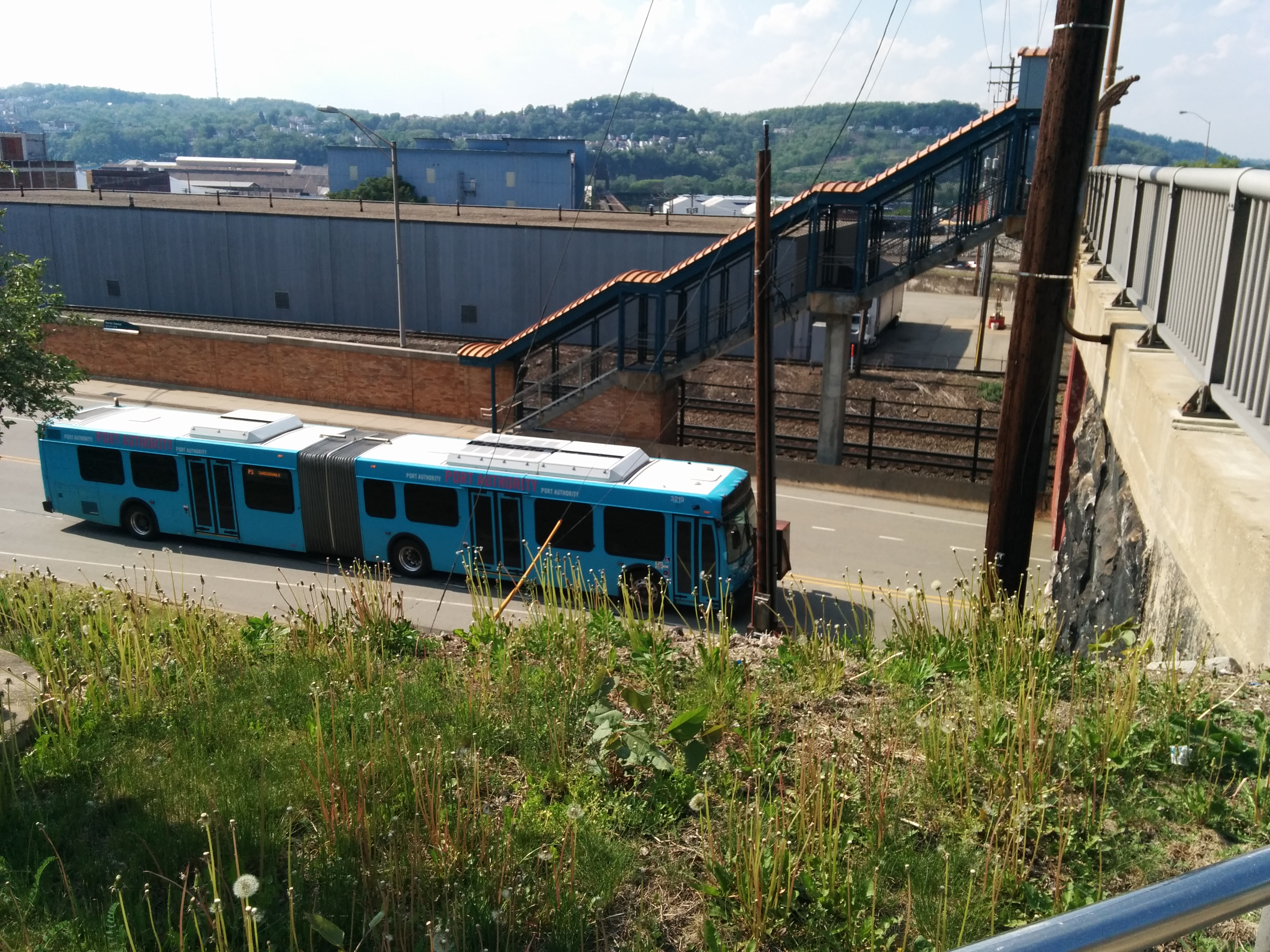 IMG_20150511_163320